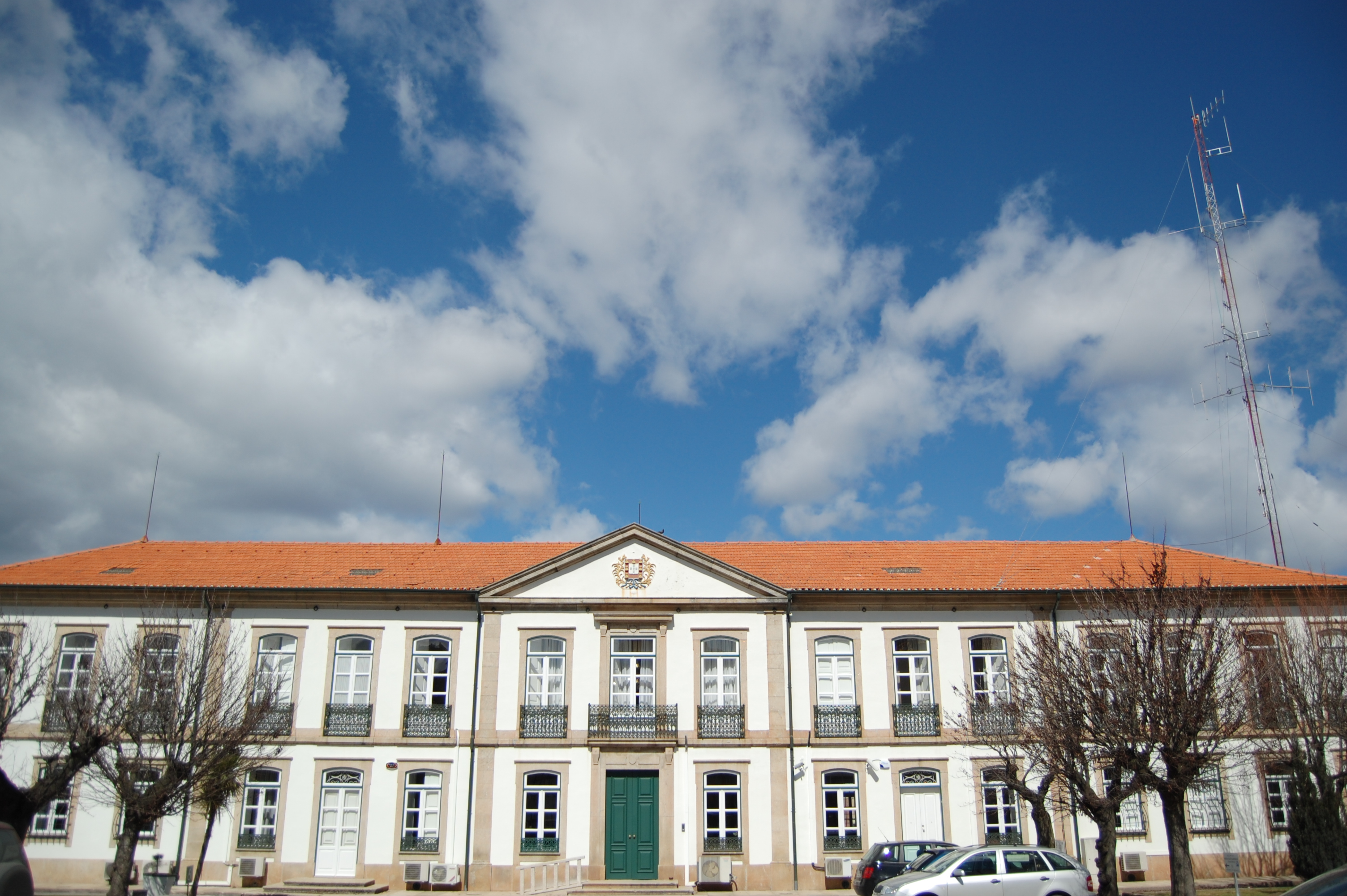 Sede do governo civil do distrito de Bragança, no nordeste de Portugal.